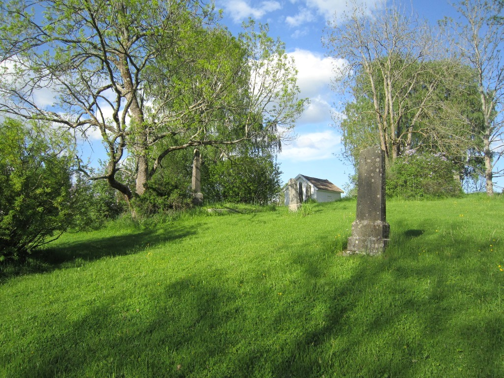 Løken gamle kirkegård, tidligere kirkested på Løken